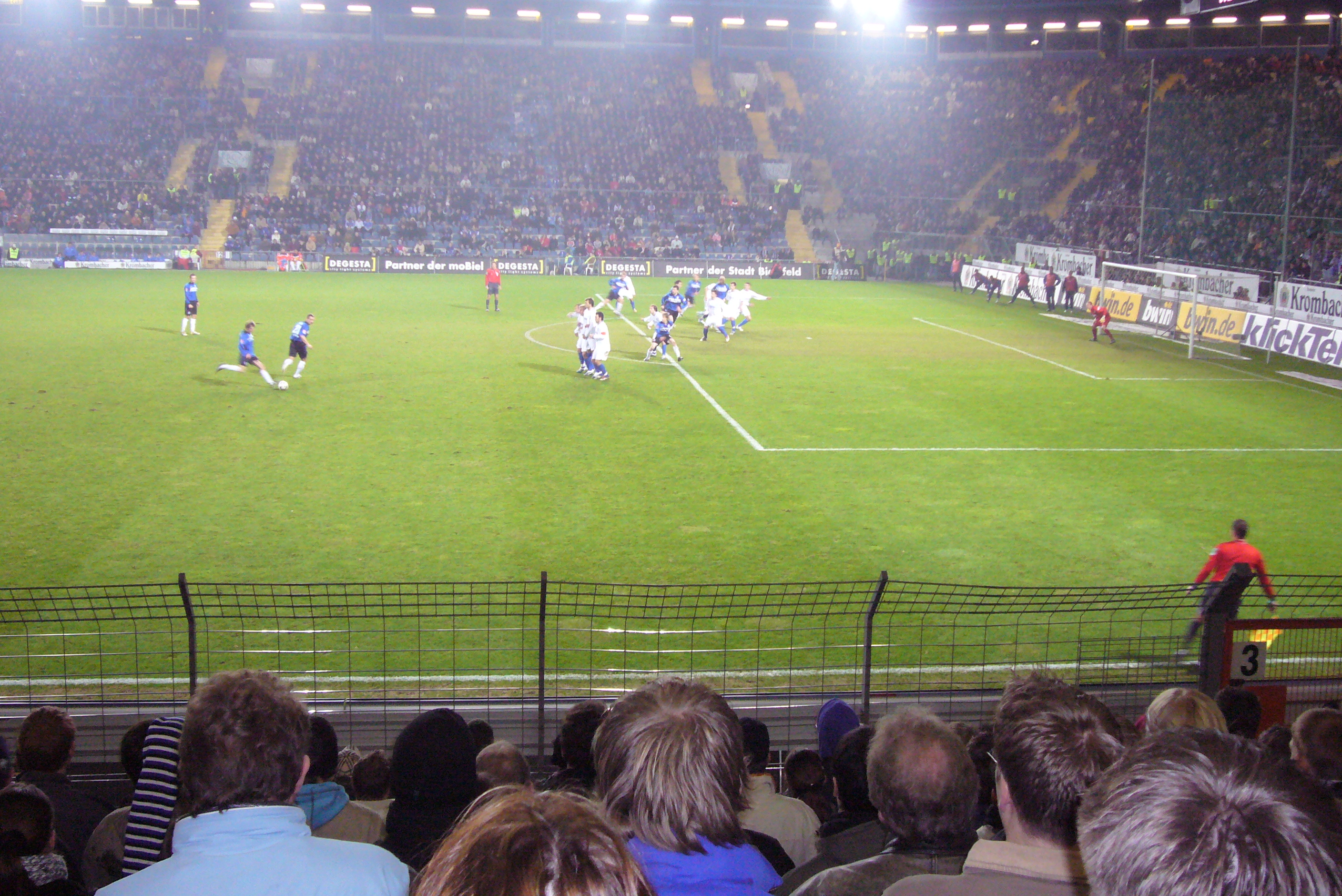 Arminia Bielefeld beim Freistoß gegen den Vfl Bochum am 18. Feb. 2007 (kein Tor)